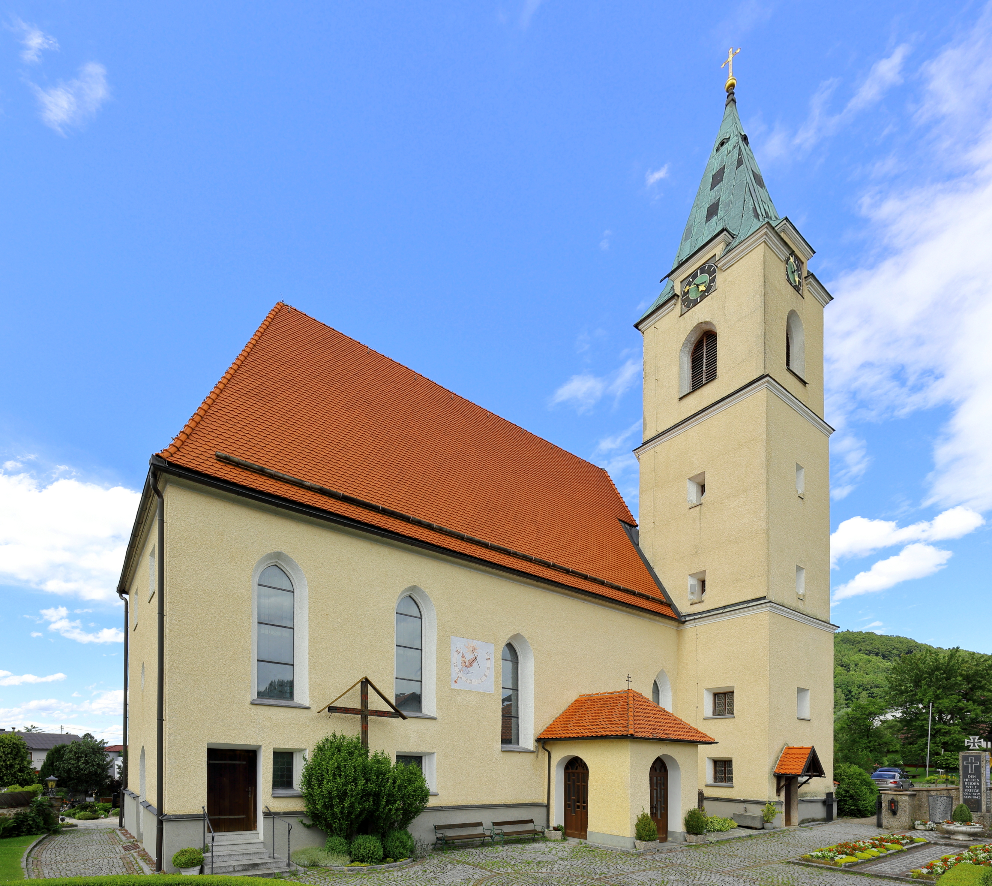 Südwestansicht der röm.-kath. Pfarrkirche hl. Valentin in der oberösterreichischen Gemeinde Weyregg am Attersee.Die spätgotische Kirche wurde in der zweiten Hälfte des 15. Jahrhunderts errichtet. 1931/1932 erfolgte eine Erweiterung Richtung Westen um rund acht Meter und im Anschluss erhielt die Kirche im südlichen Chorwinkel einen Kirchturm, nachdem sie bis dorthin nur einen Dachreiter hatte.